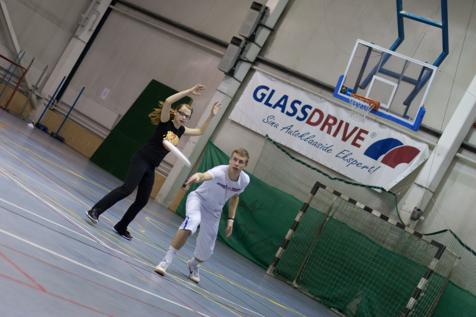 Tartu frisbeeklubi. Tartu Ülikooli spordihoone.